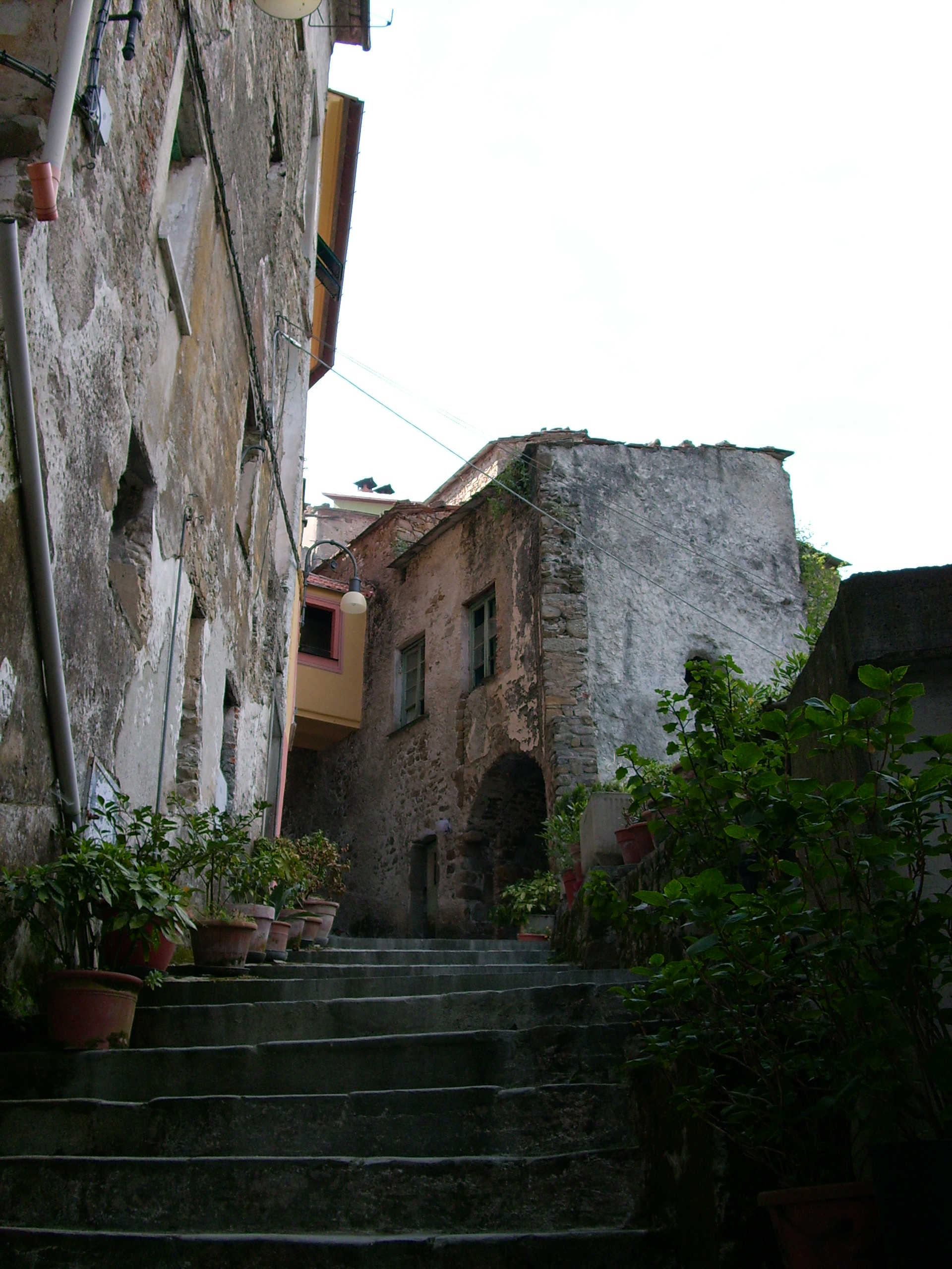 Centro storico di Beverino Castello, Liguria, Italia